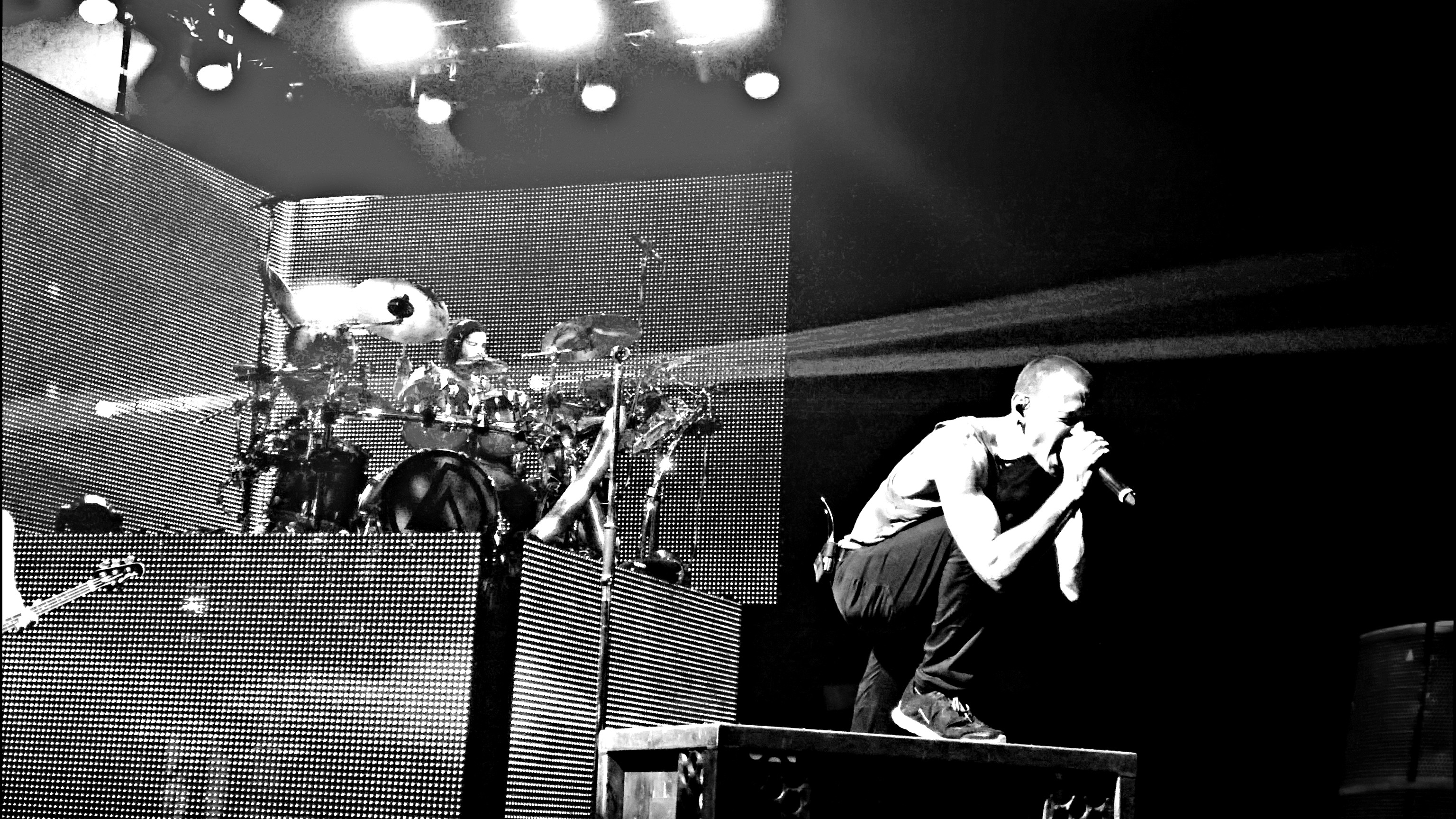 Linkin Park, O2 Arena, London